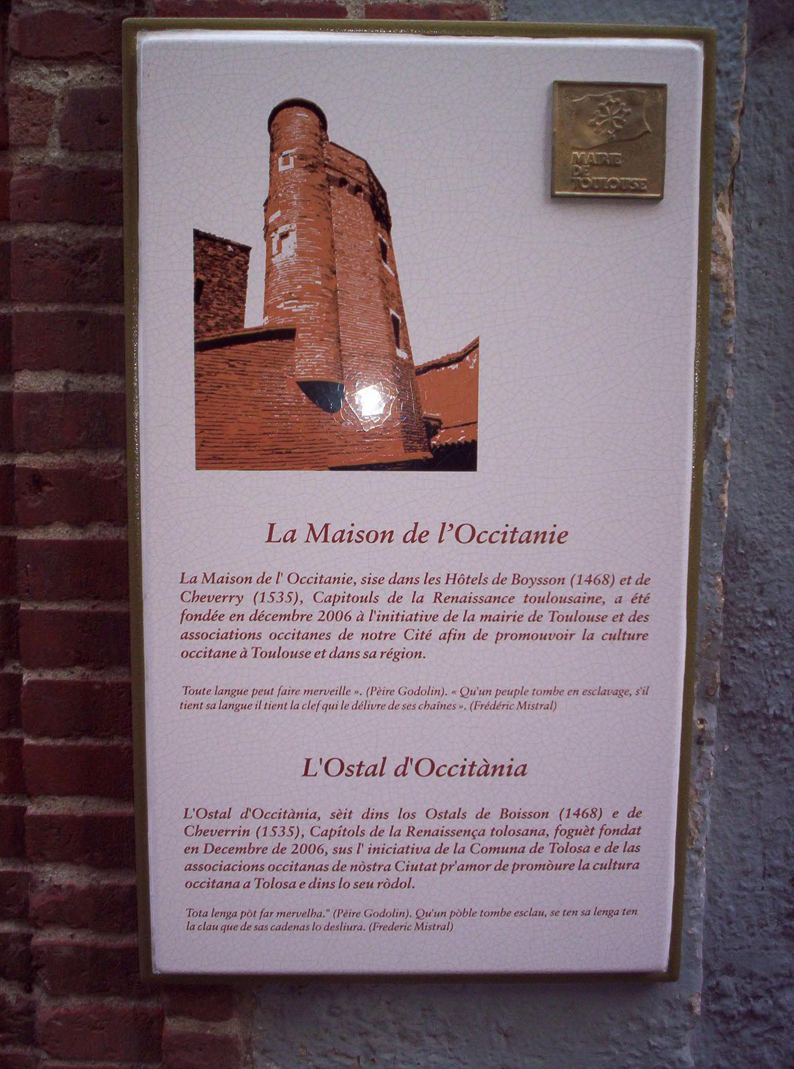 Fach per ieu Cedric31